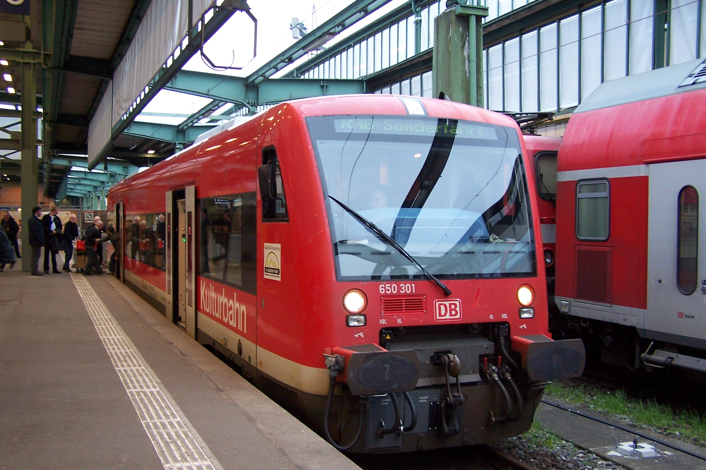 Regio-Shuttle 650 301 der DB in Stuttgart Hbf, bei einer Sonderfahrt der Horber-Schienentage